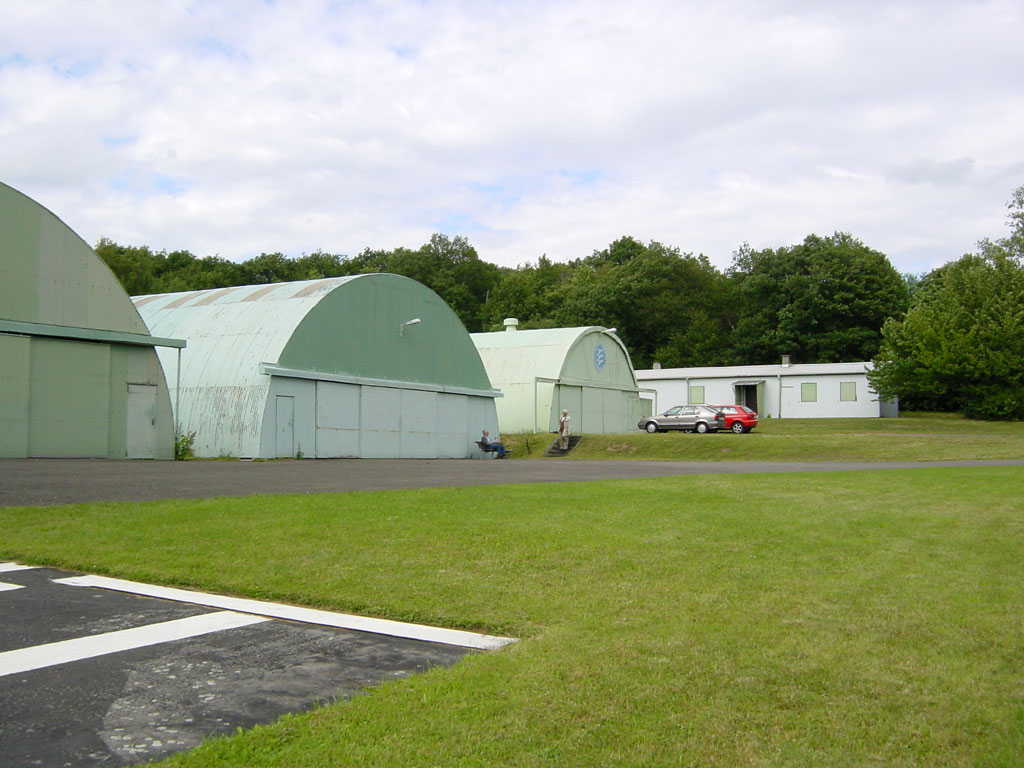 Blick auf die Hallen und das Vereinsheim des LSV Eßweiler. Bild: Marco Creutz